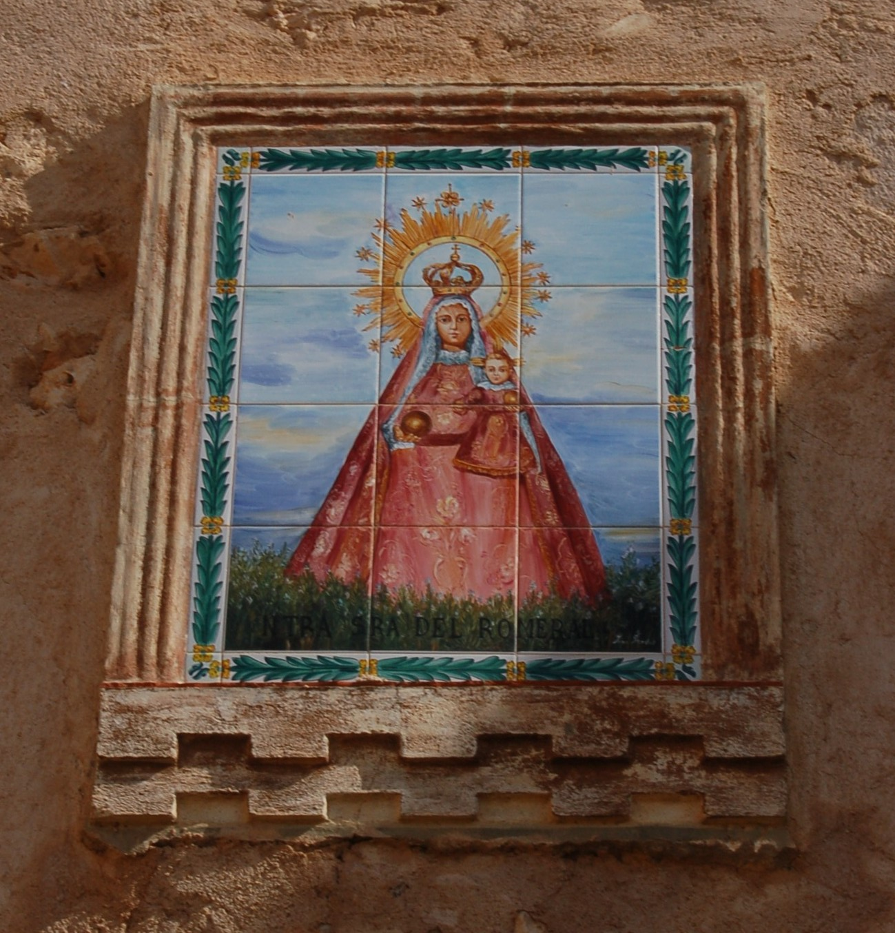 Pintura de Nuestra Señora del Romeral na igrexa de Hontecillas